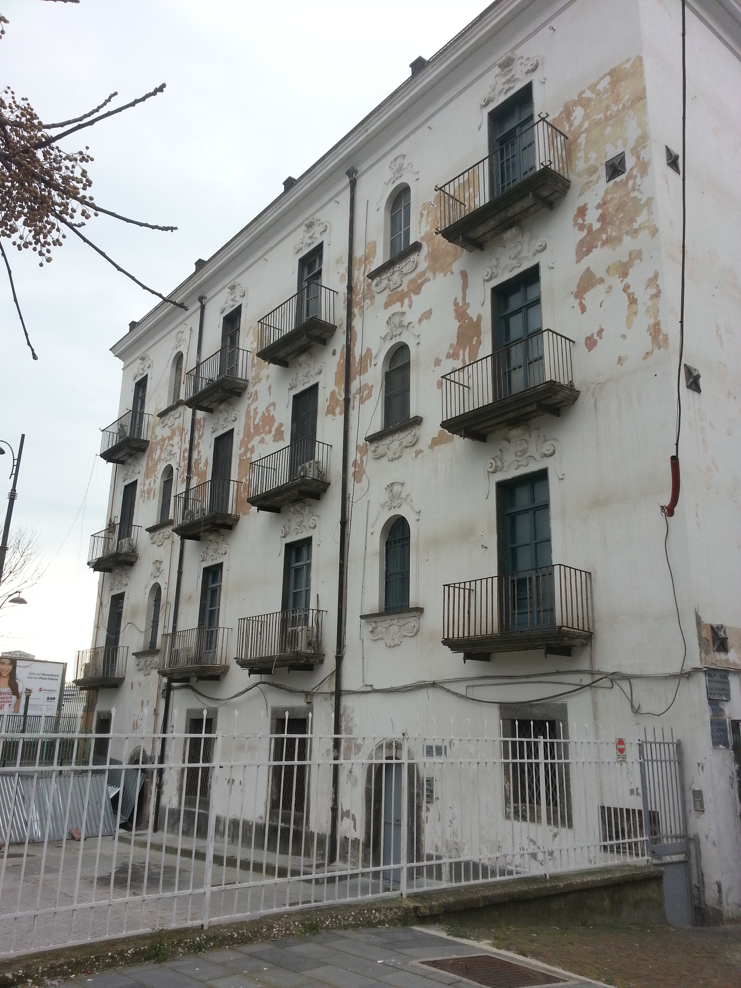 Palazzina annessa alla chiesa di Santa Maria di Portosalvo